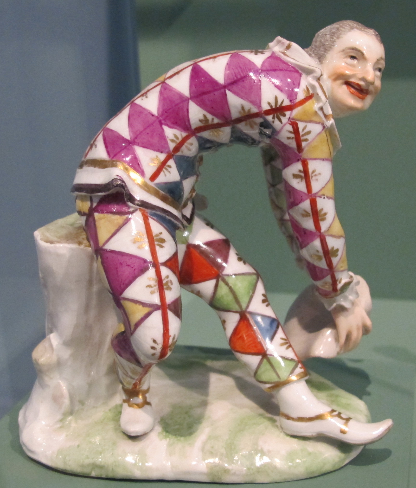 Johann joachim kaendler, arlecchino fa la riverenza, meissen, 1740-1744 ca.